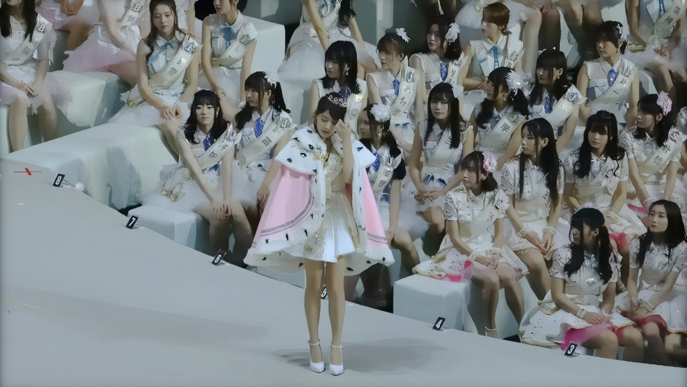 170729总选重修版 这个比刚才那两张会好一些